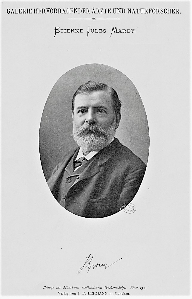 Etienne Jules Marey Ouvrage : Galerie hervorragender ärzte und naturforscher Edition : Munich : J. F. Lehmann, s.d.